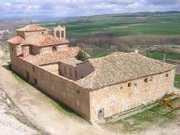 fotografía del convento de san vitores en fresno de rio tirón